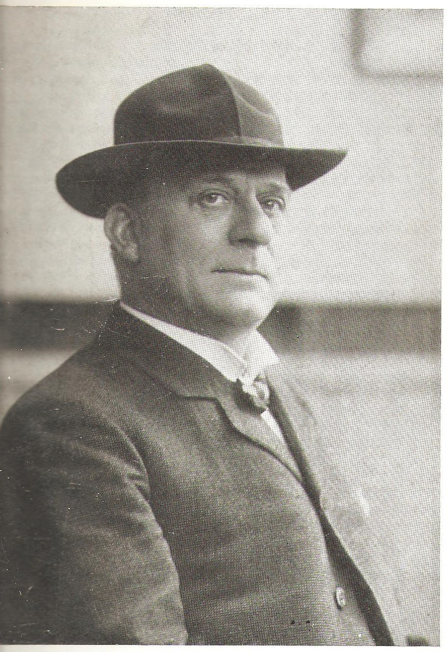 Bouwmeester Frits 184-1906